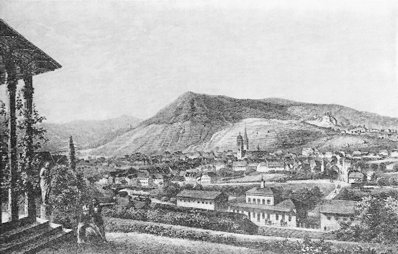 Neustadt aus südöstlicher Richtung